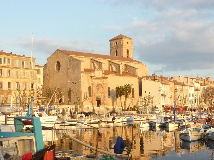 Eglise Notre-Dame de l'Assomption, La Ciotat, France